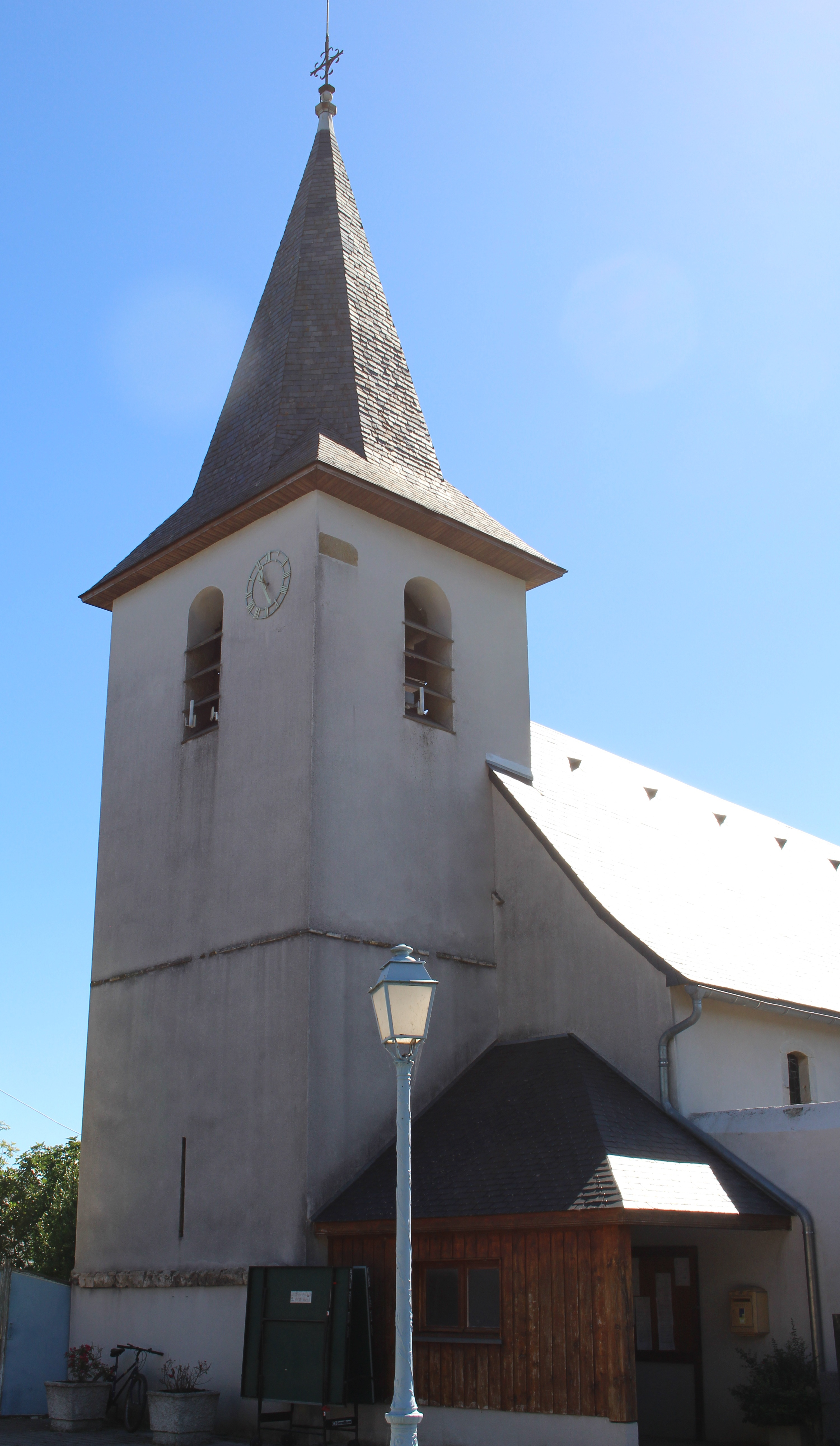 Église Saint-Germain-d'Auxerre de Poumarous (Hautes-Pyrénées)